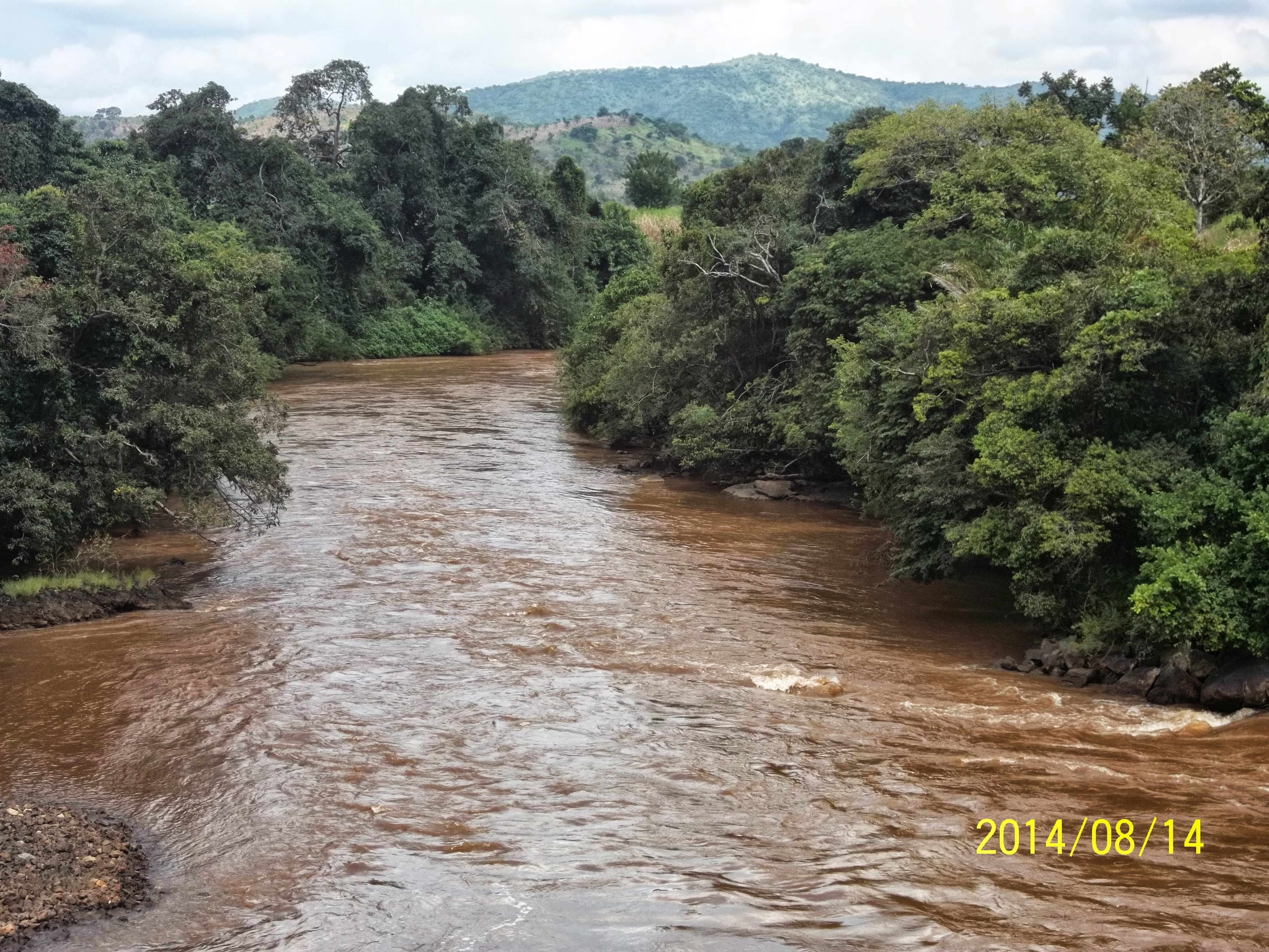 Le Noun, fleuve du Cameroun